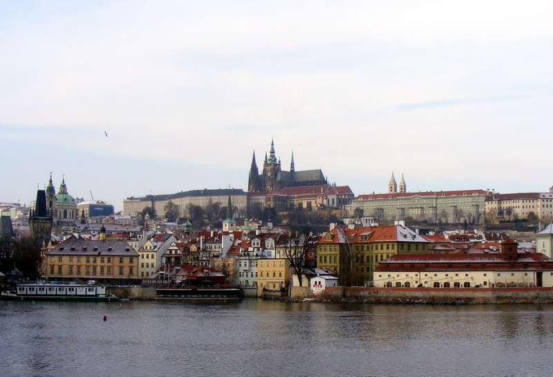 Prag - Hradčani